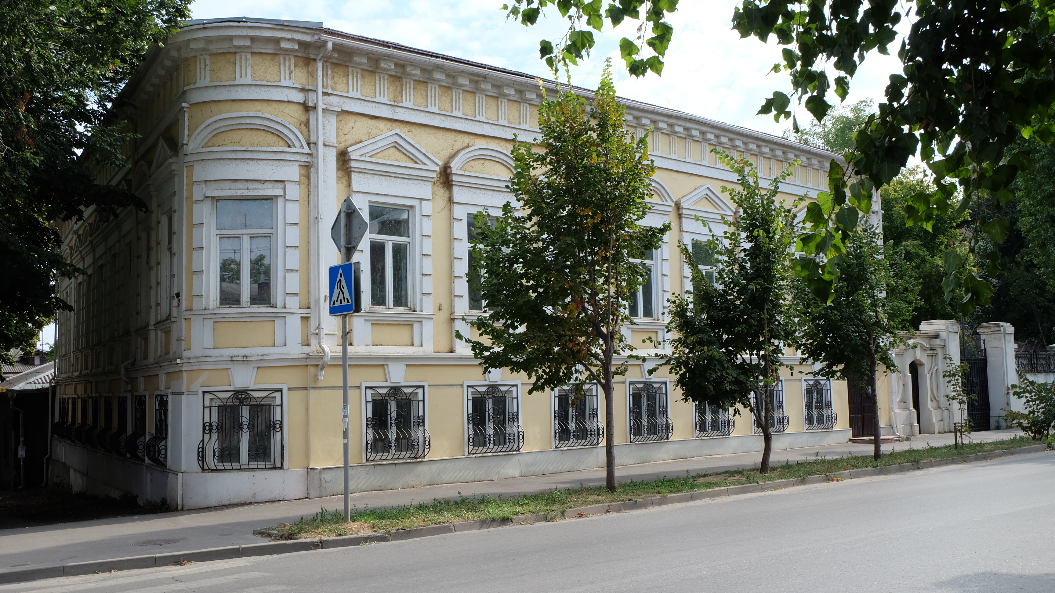 Жилой дом, комплекс застройки улицы: улица Греческая, 50, Таганрог, Ростовская область